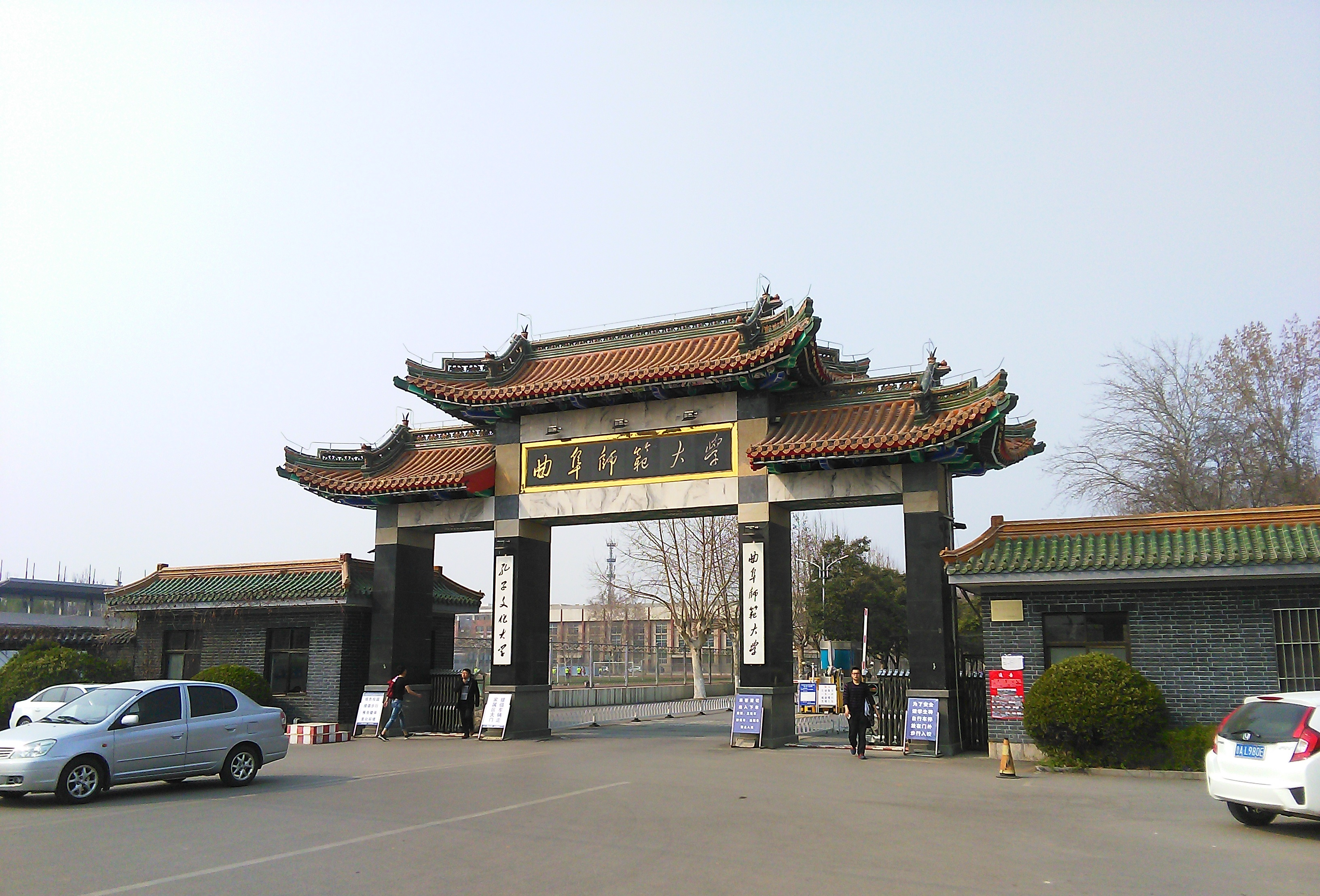 中文（中国大陆）: 曲阜师范大学大门